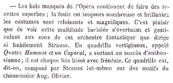 Article sur les bals masqués à l'Opéra de Paris.